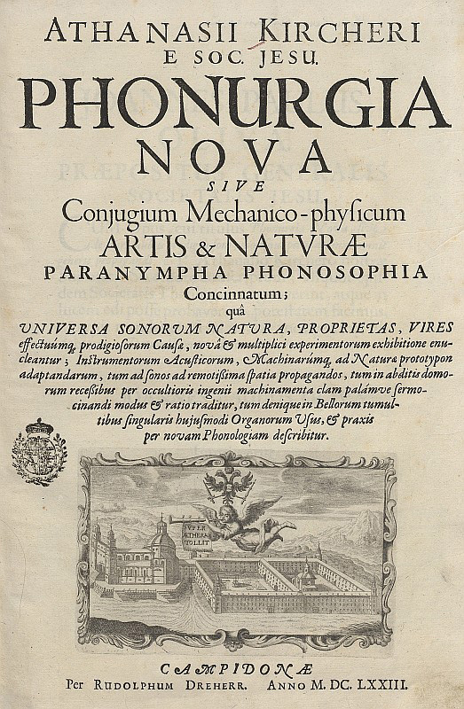 Original image description from the Deutsche FotothekAkustik & Schall & Instrument